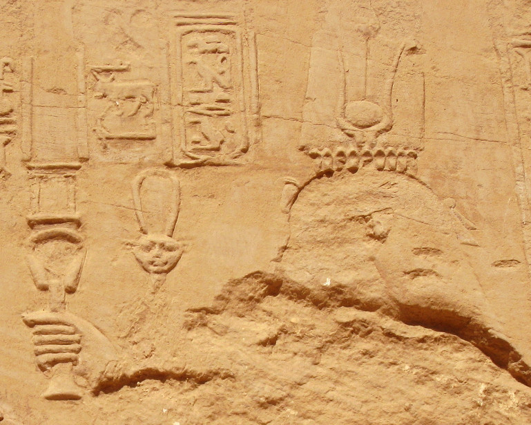 Cleopatra I. El Kab